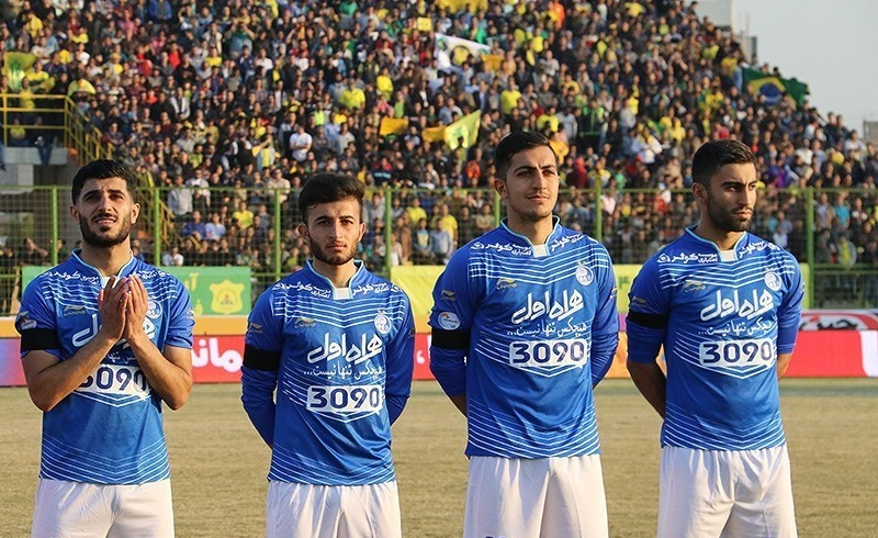 دیدار تیم های فوتبال نفت آبادان و استقلال تهران